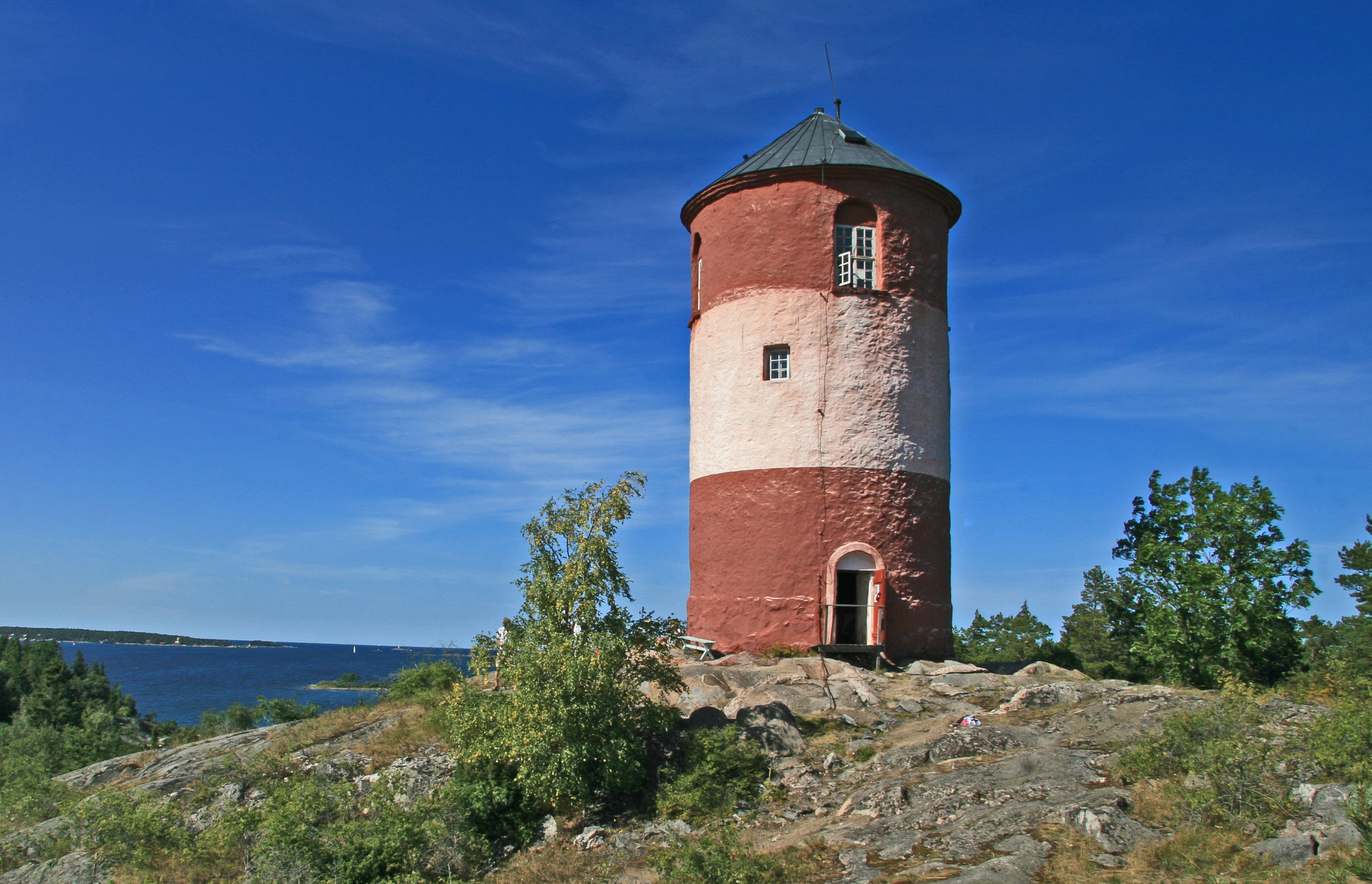 Båken, Arholma 26 juli 2006